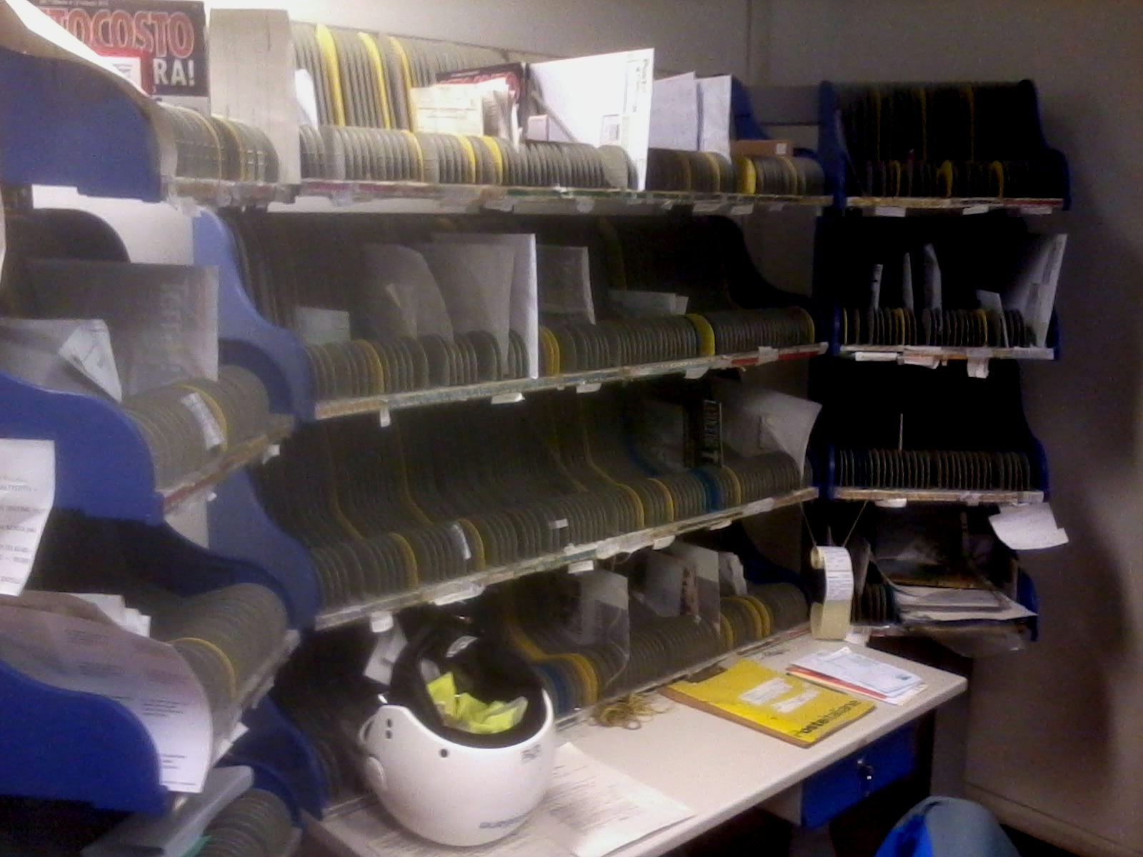 Casellario postale in un ufficio postale. Il portalettere ordina la posta in base alle vie ed ai numeri civici in base a questo strumento. Prima di partire raccoglie la posta ordinata e segue l'itinerario. Ad ogni posto, corrispondono uno o più numeri civici. Ove possibile, ad ogni numero civico viene riportato il cognome dei residenti, in modo da facilitare il lavoro di smistamento e correzione, in caso di indirizzi insufficienti, inesatti o nominativi sconosciuti.